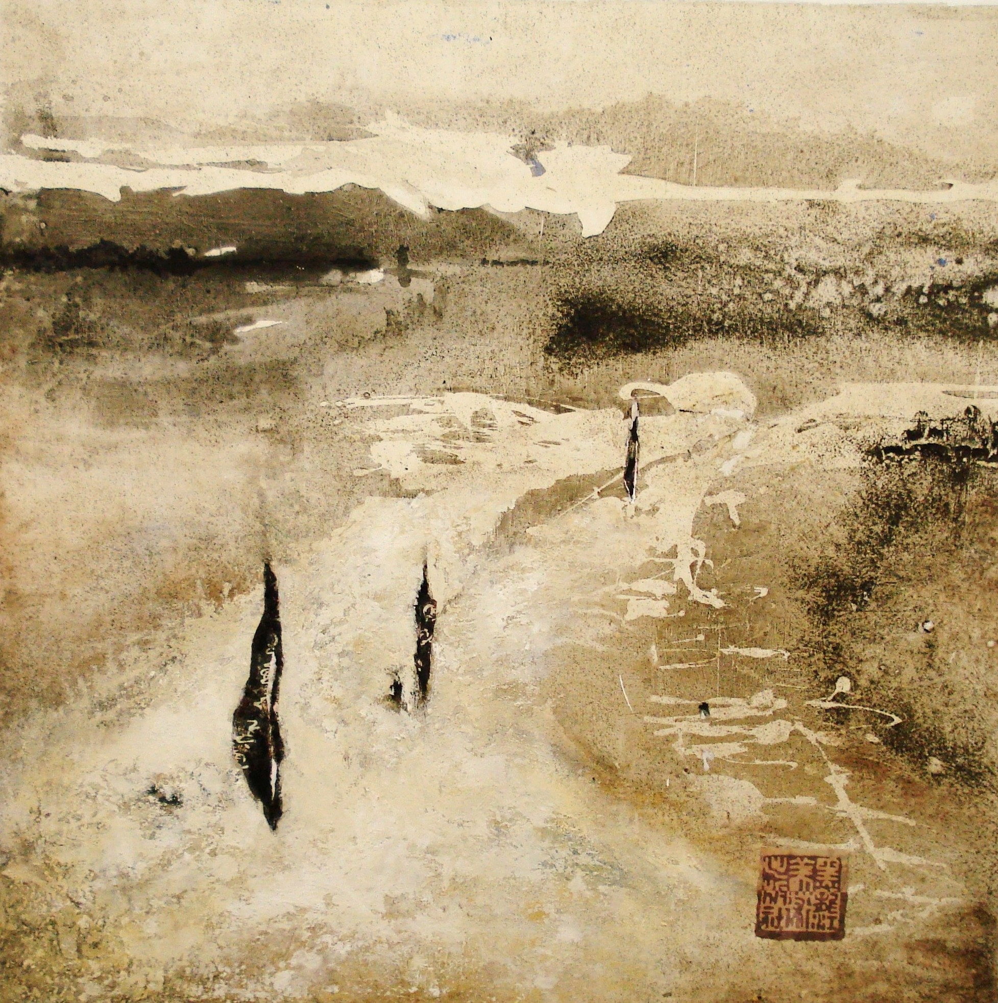 I hear the water dreaming de Li Chevalier